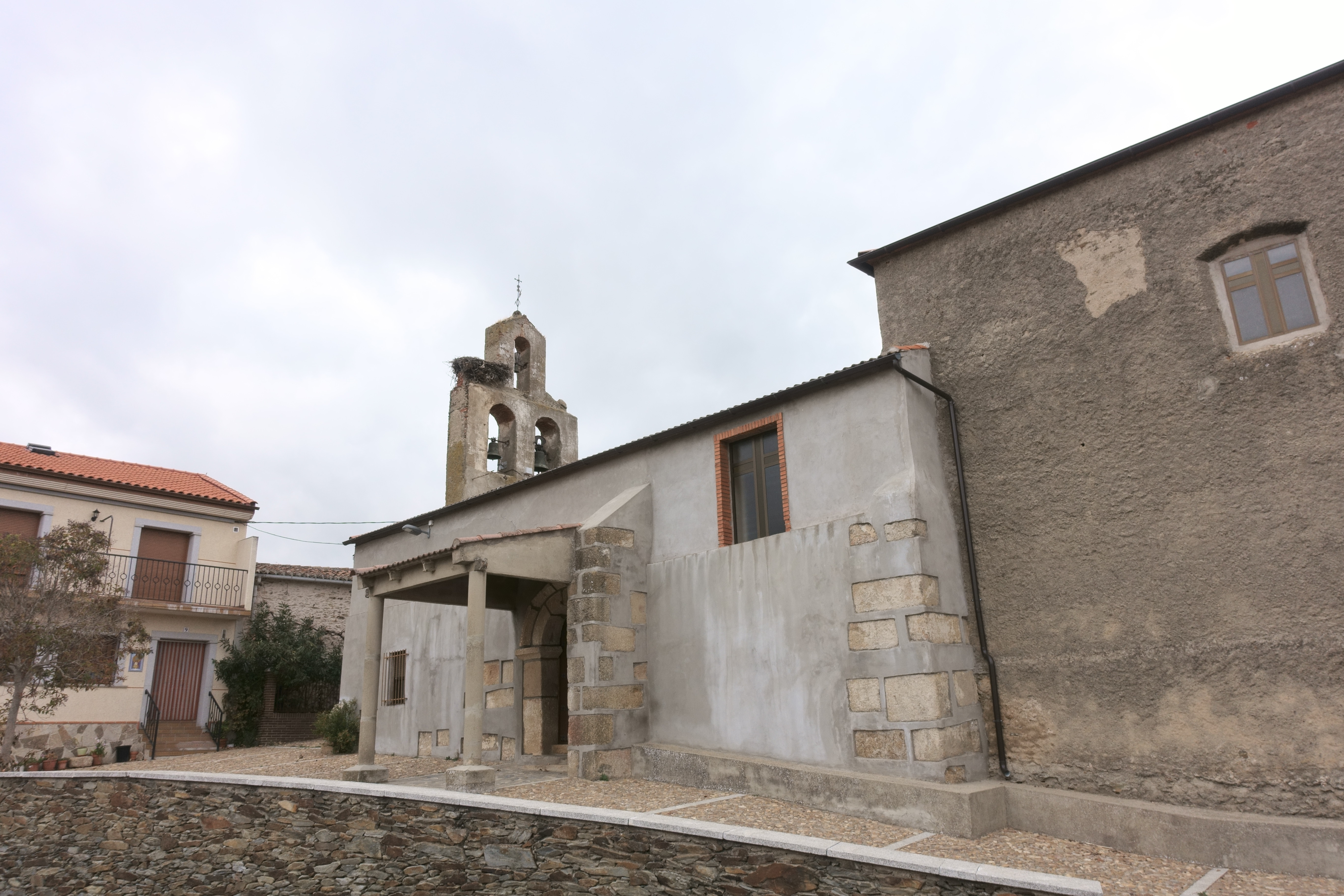 Iglesia de Nuestra Señora de las Nieves, Herguijuela de Ciudad Rodrigo (Salamanca, España).